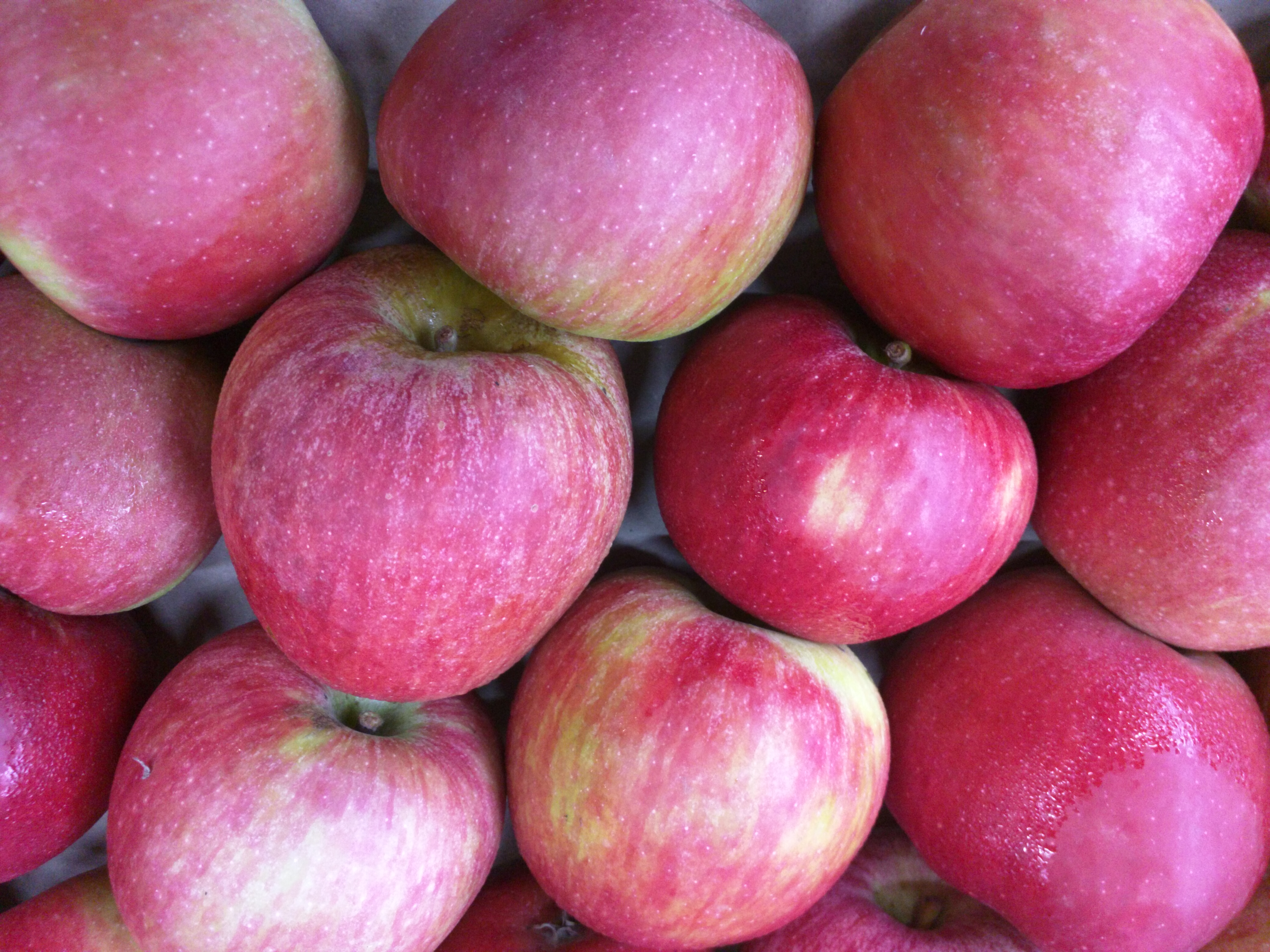 mele stayman